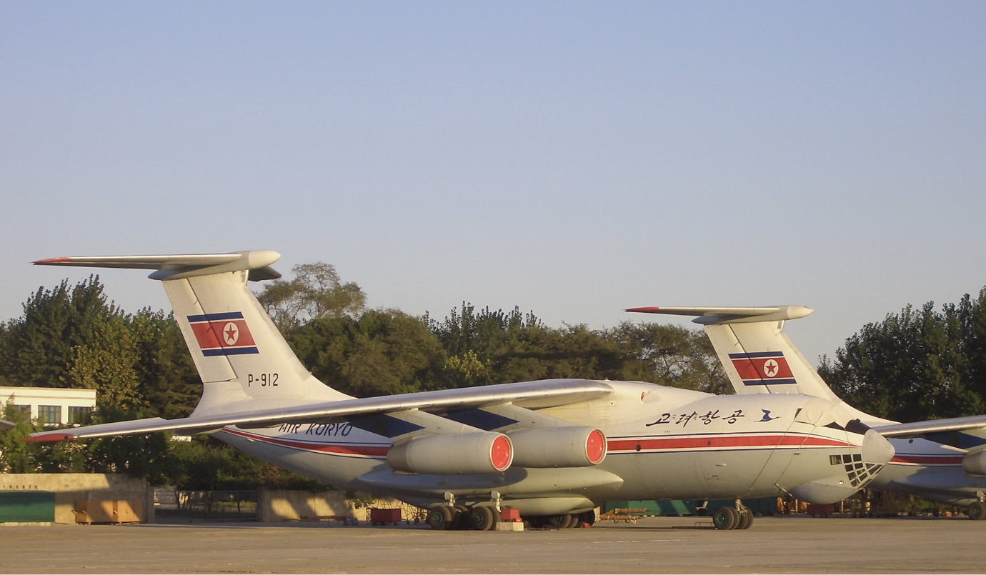 Air Koryo Ilyushin Il-76MD